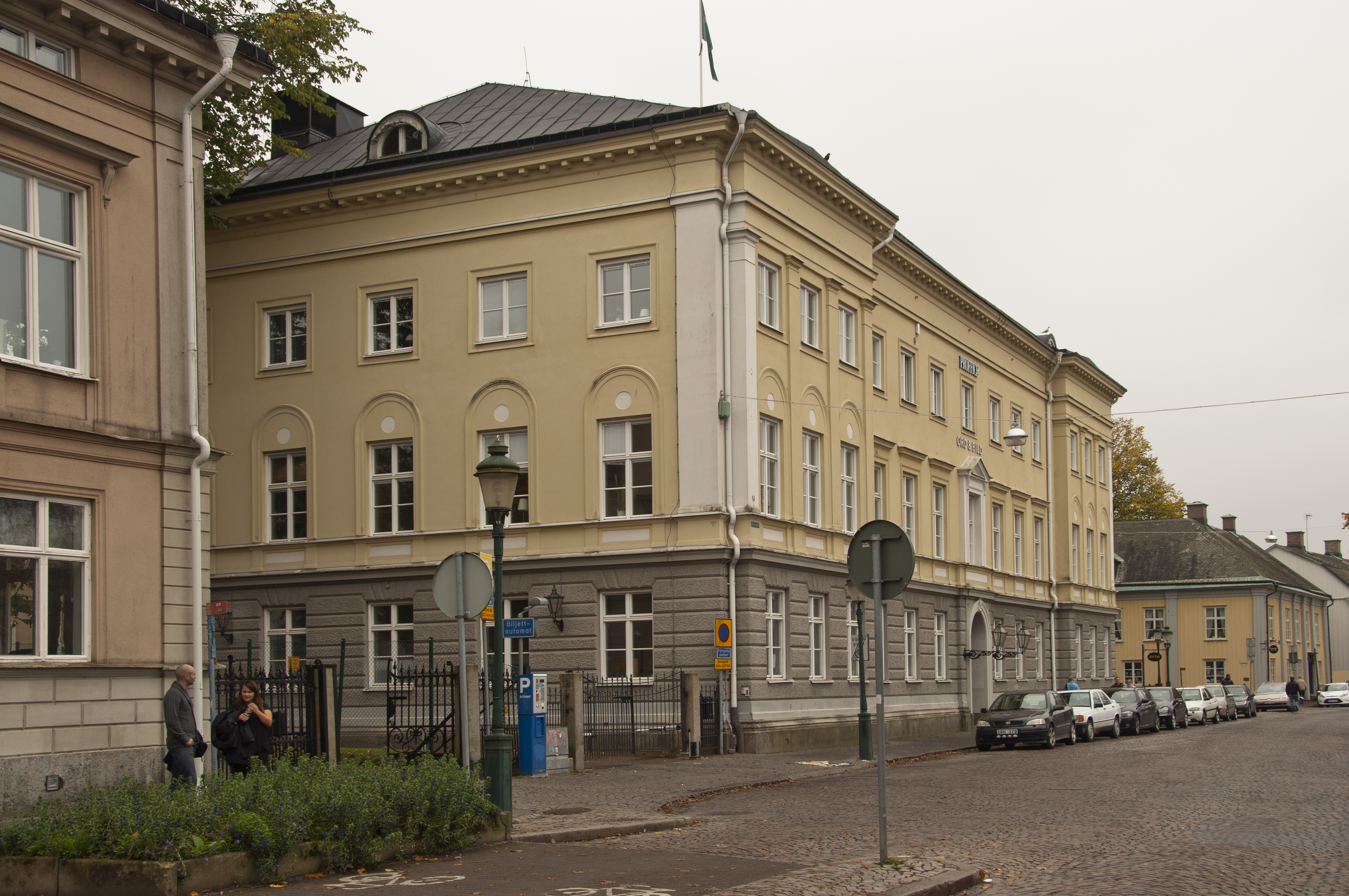 Telegrafhuset, Karlstad. Uppfört av Wermlandsbanken 1866. Arkitekt Johan Fredrik Åbom. 1935 påbyggt för Telegrafverket av Aron Johansson